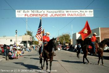 Florence Junior Parada on 27-11-2004